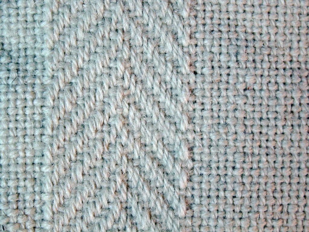 foto mia personale, saia batavia a spina di pesce, 2007 Licensing Categoria:Immagini sulla tessitura